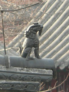 Photographie d'une représentation de Chaofeng.